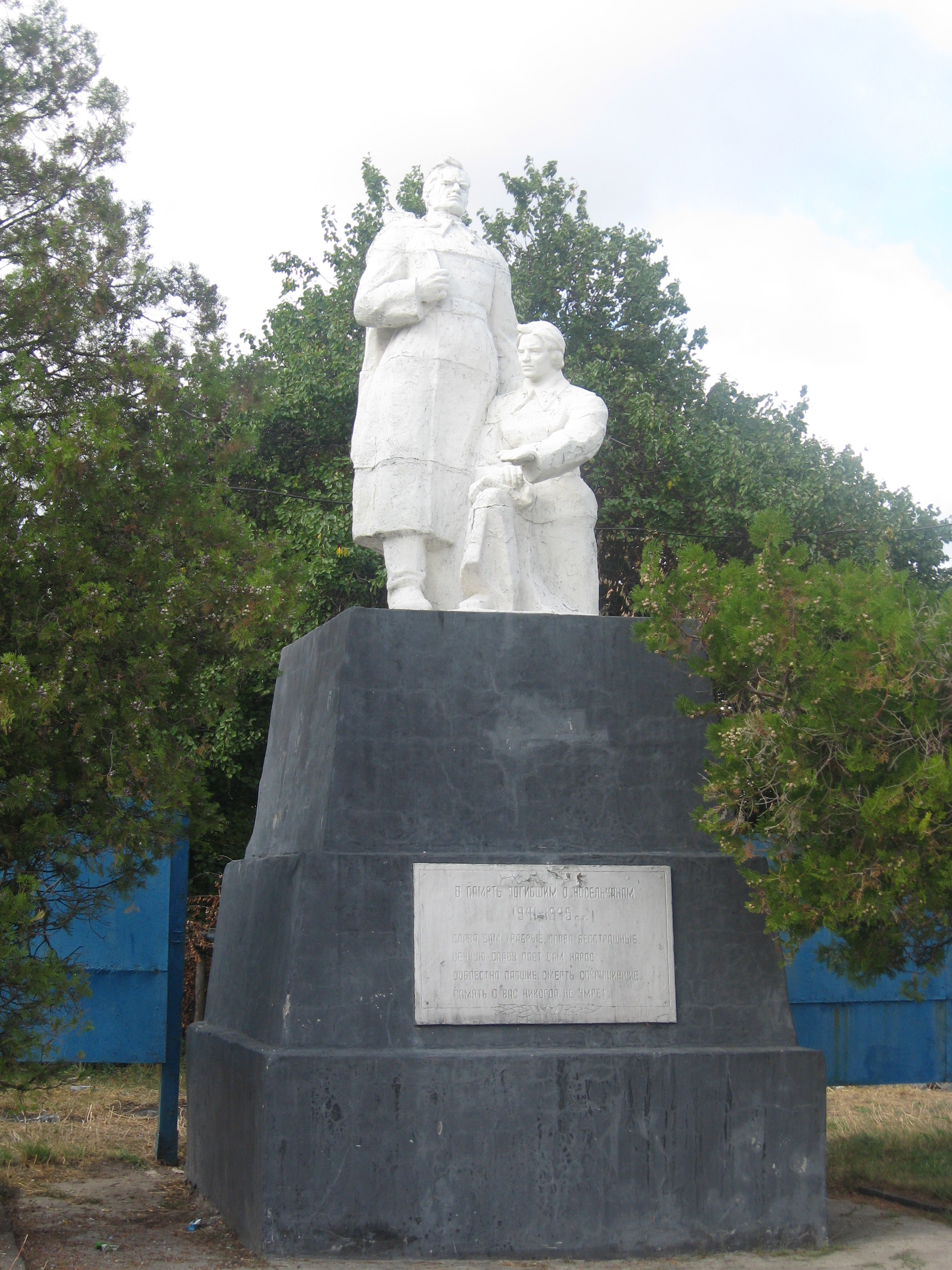 Памятник погибшим воинам и жителям села Зайцево